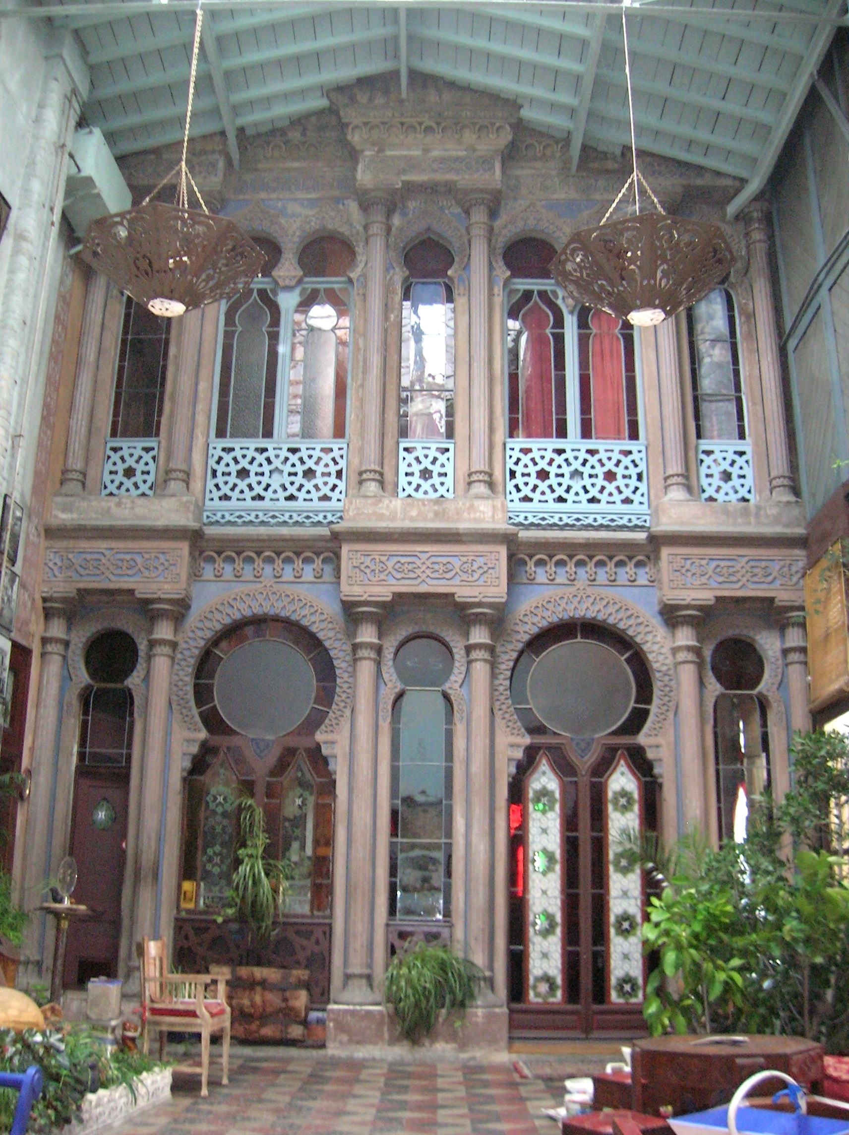 Casamaures, Saint-Martin-le-Vinoux, Isère, France.